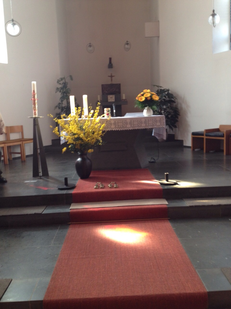 Neuer Altar geschmückt mit Blumen. Hier hält der Pater die Messe.